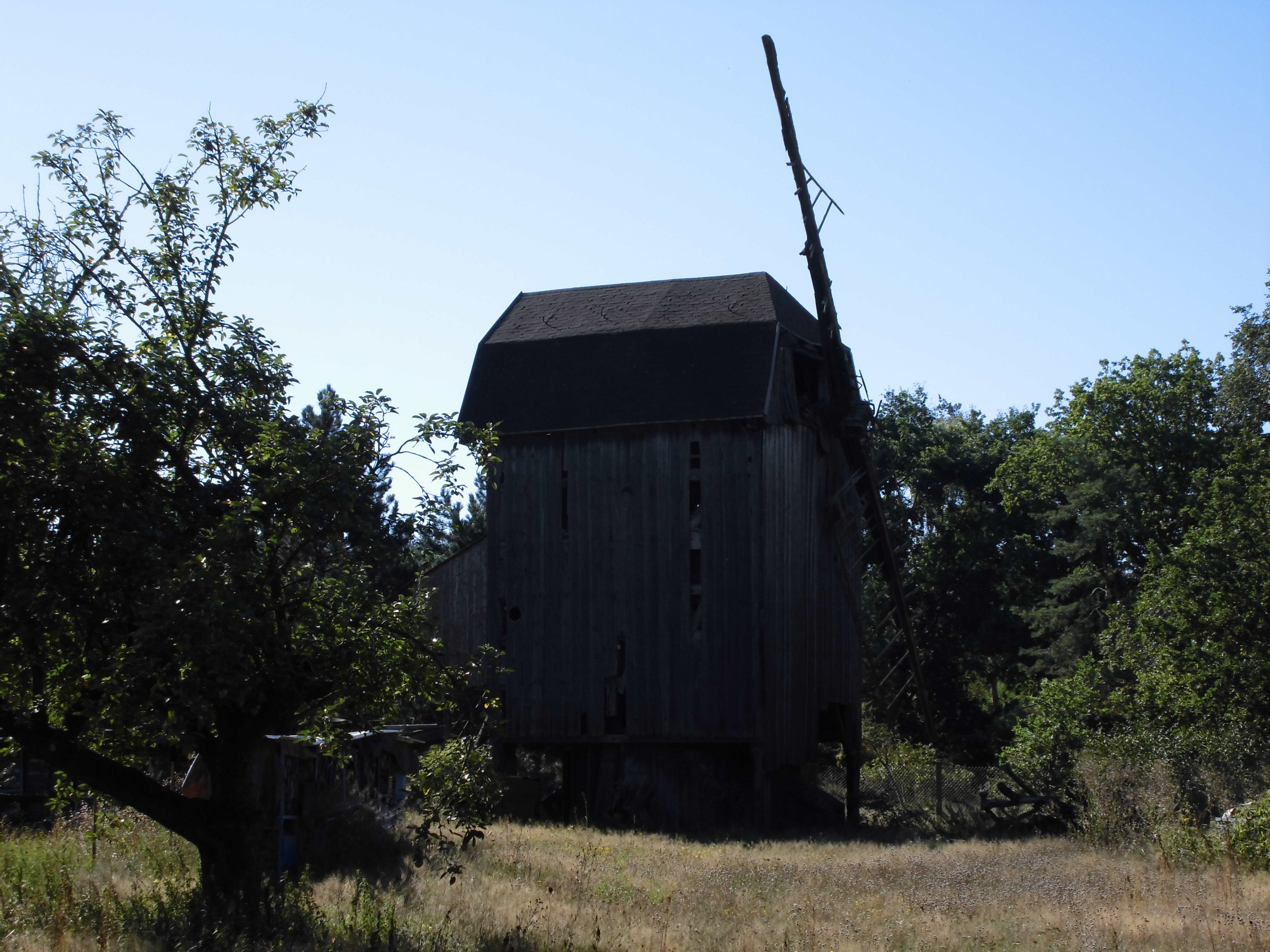 Denkmalgeschützte Windmühle in Schweinitz, Gemeinde Jessen (Elster)